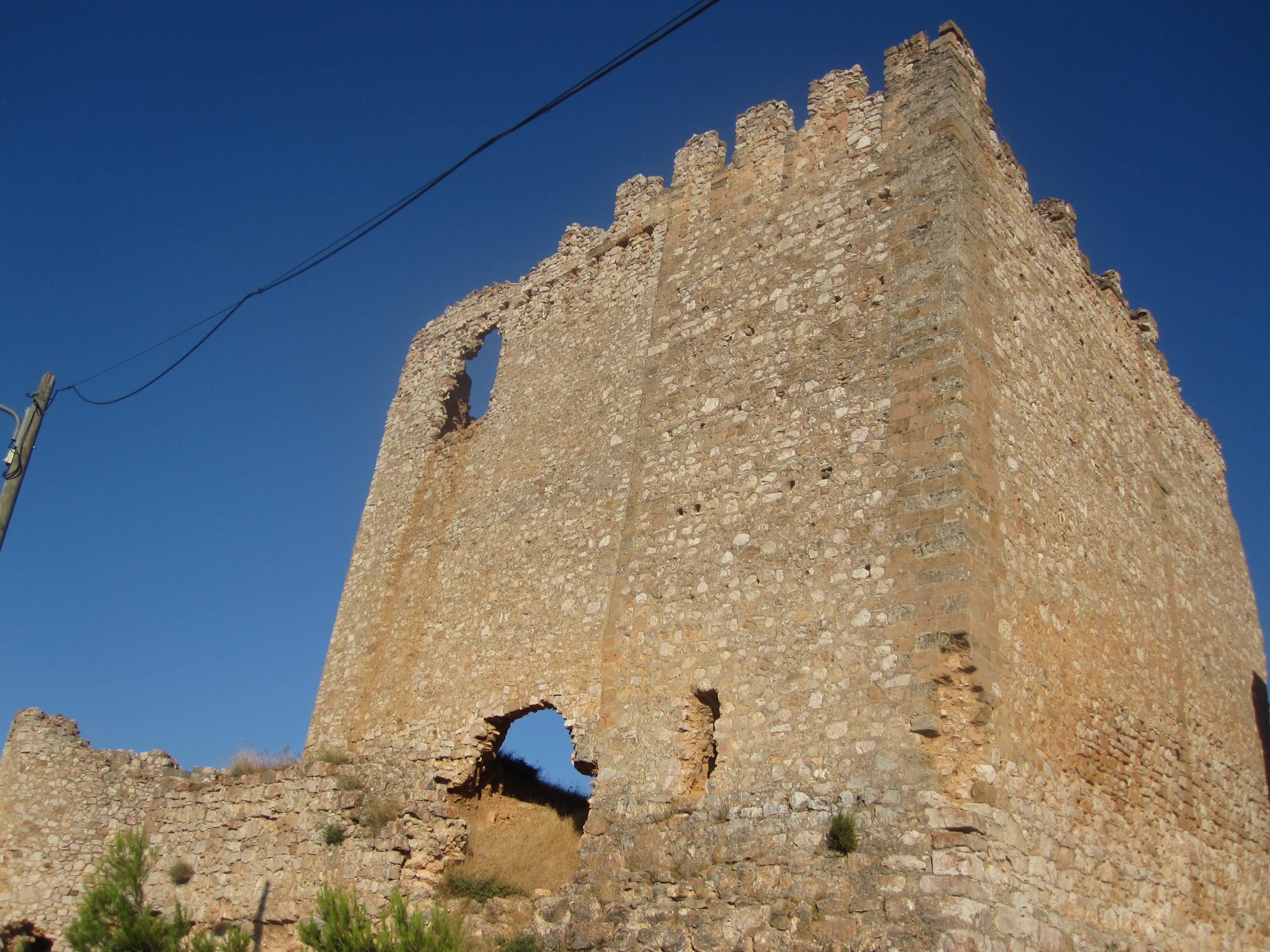 El Castillo del pueblo de Sisamón.